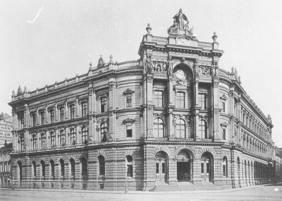 Oberpostdirektion Dresden, Eckgebäude Annenstraße/Am See